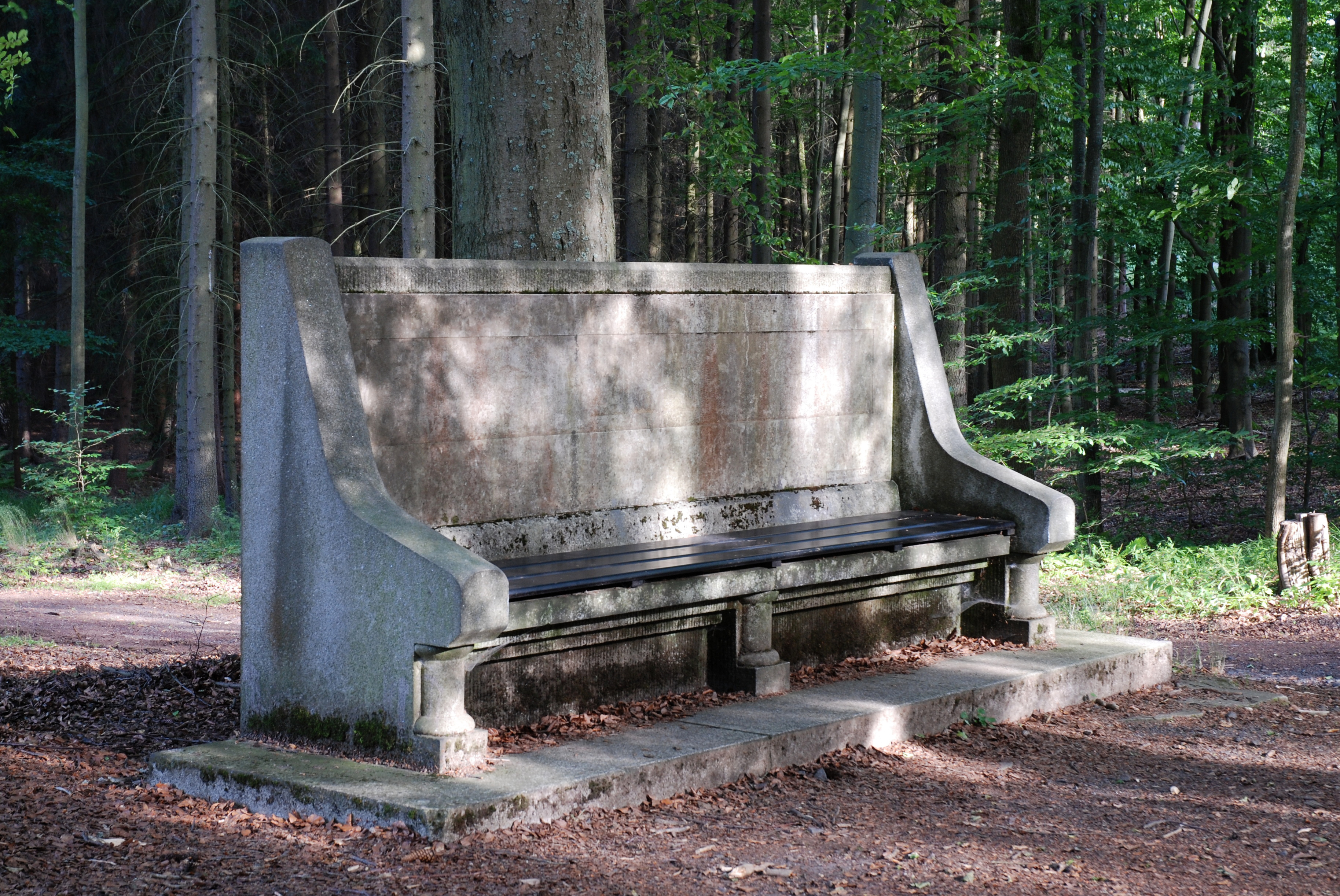 Lavička U Obrazu při cestě Přátelství v karlovarských lázeňských lesích